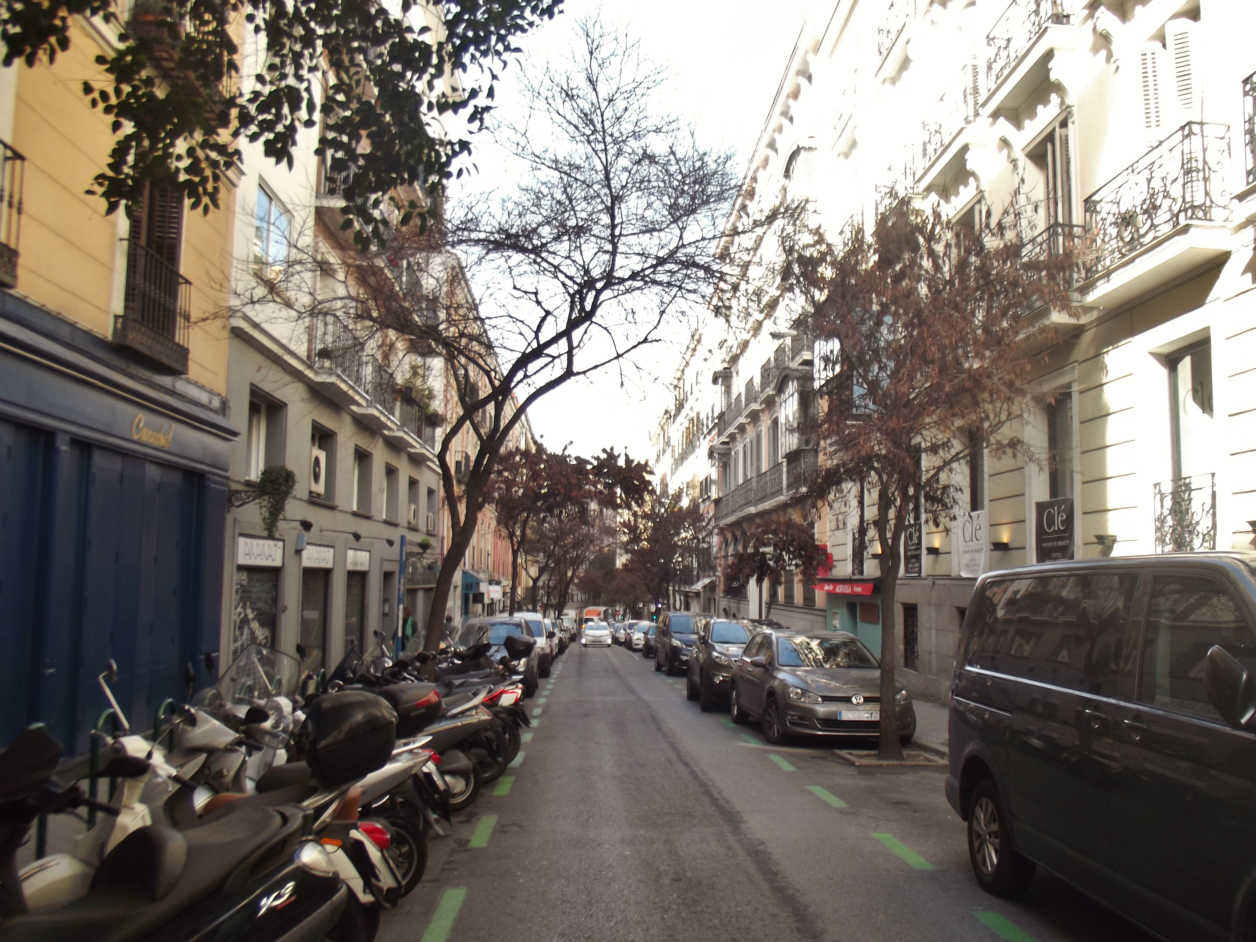 Calle del Almirante, Madrid. This is a retouched picture, which means that it has been digitally altered from its original version. Modifications: Distorted car plates.